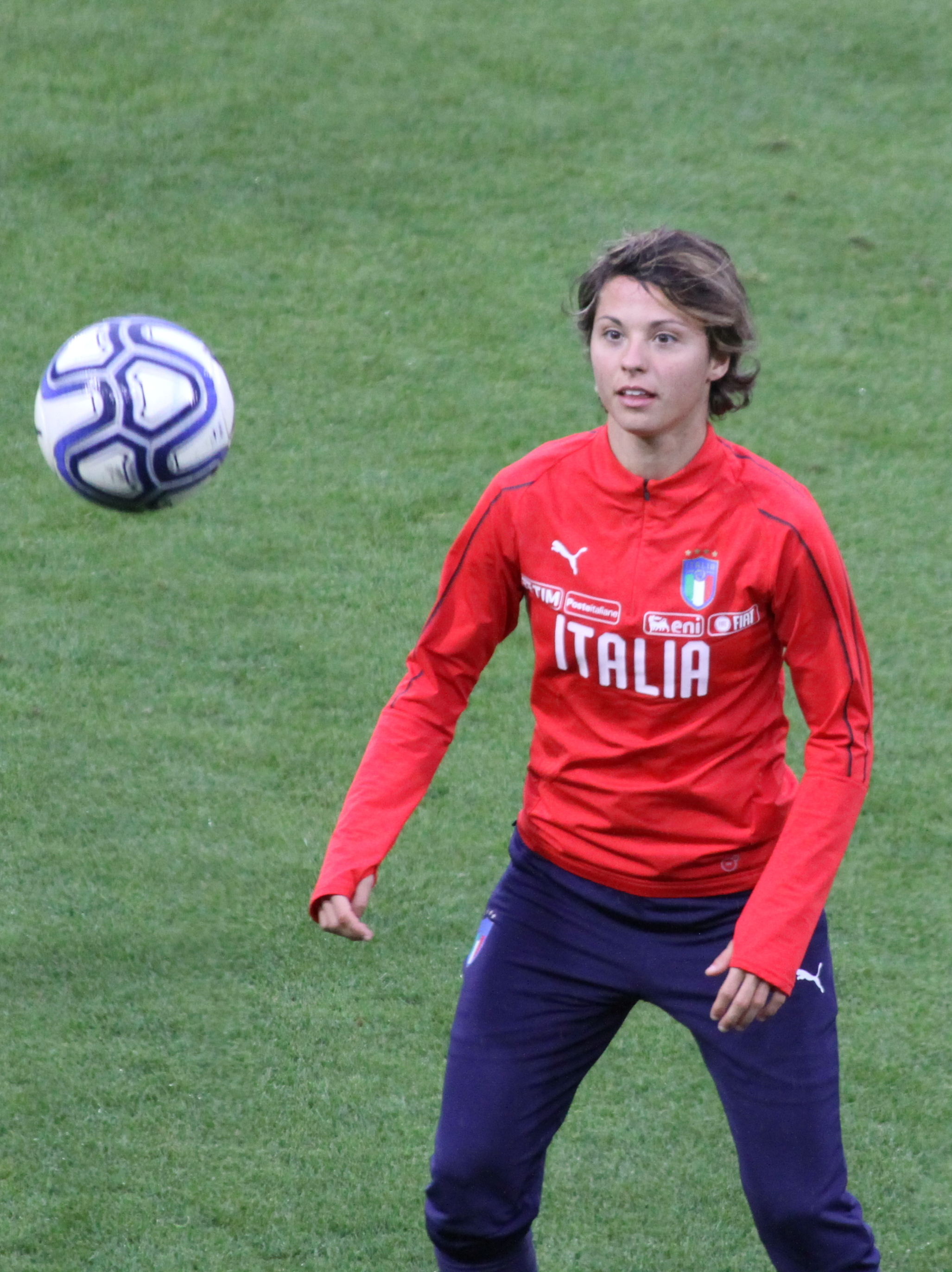 Valentina Giacinti, attaccante della nazionale di calcio femminile dell'Italia, durante il riscaldamento tra i due tempi dell'incontro Italia-Belgio del 10 aprile 2018 allo stadio Paolo Mazza di Ferrara.